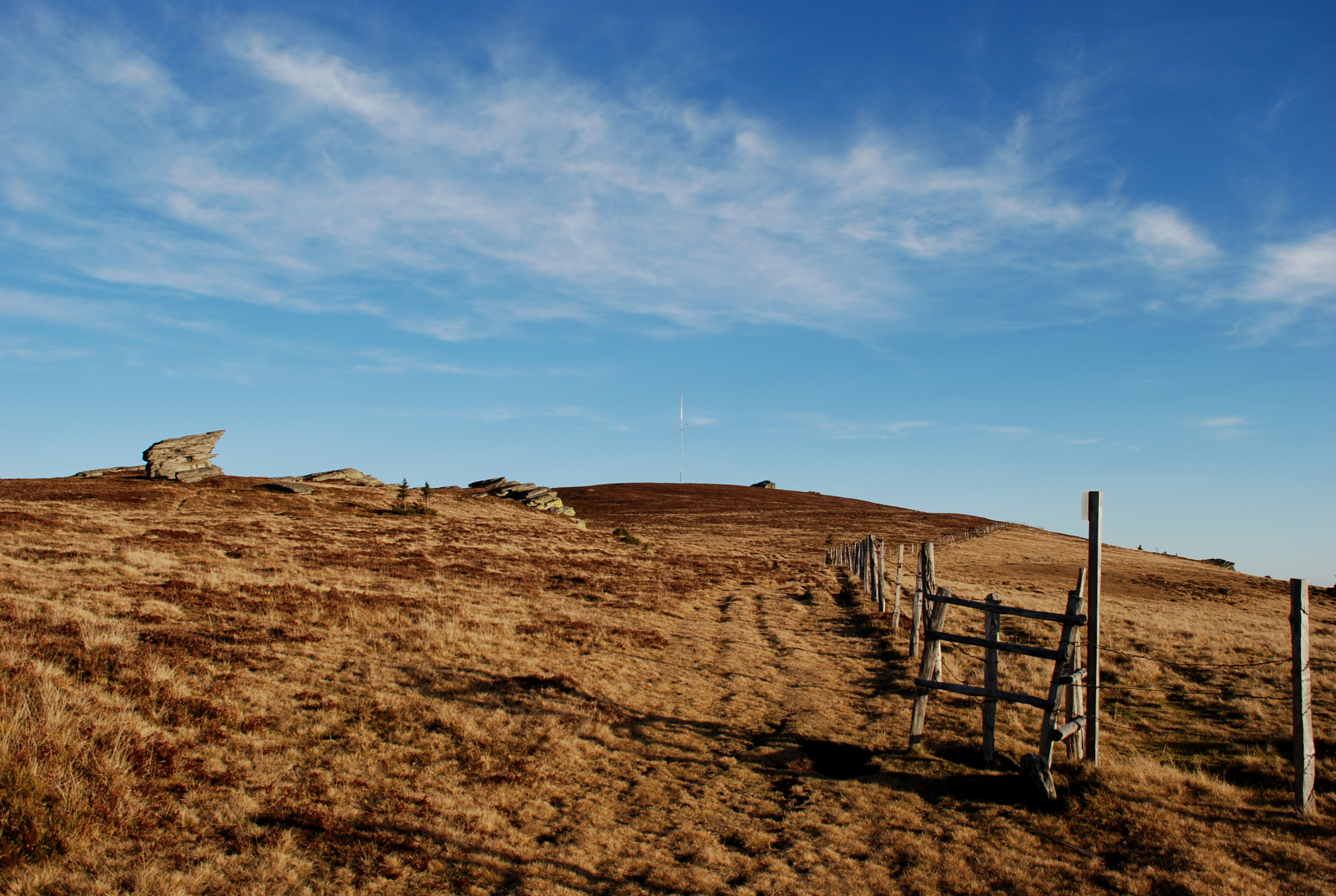 Handalm, Koralpe, Österreich: Berg und umgebende Landschaft (Almgebiet) in der mittleren Koralpe, ab 2014 Standort des Windparks Handalm